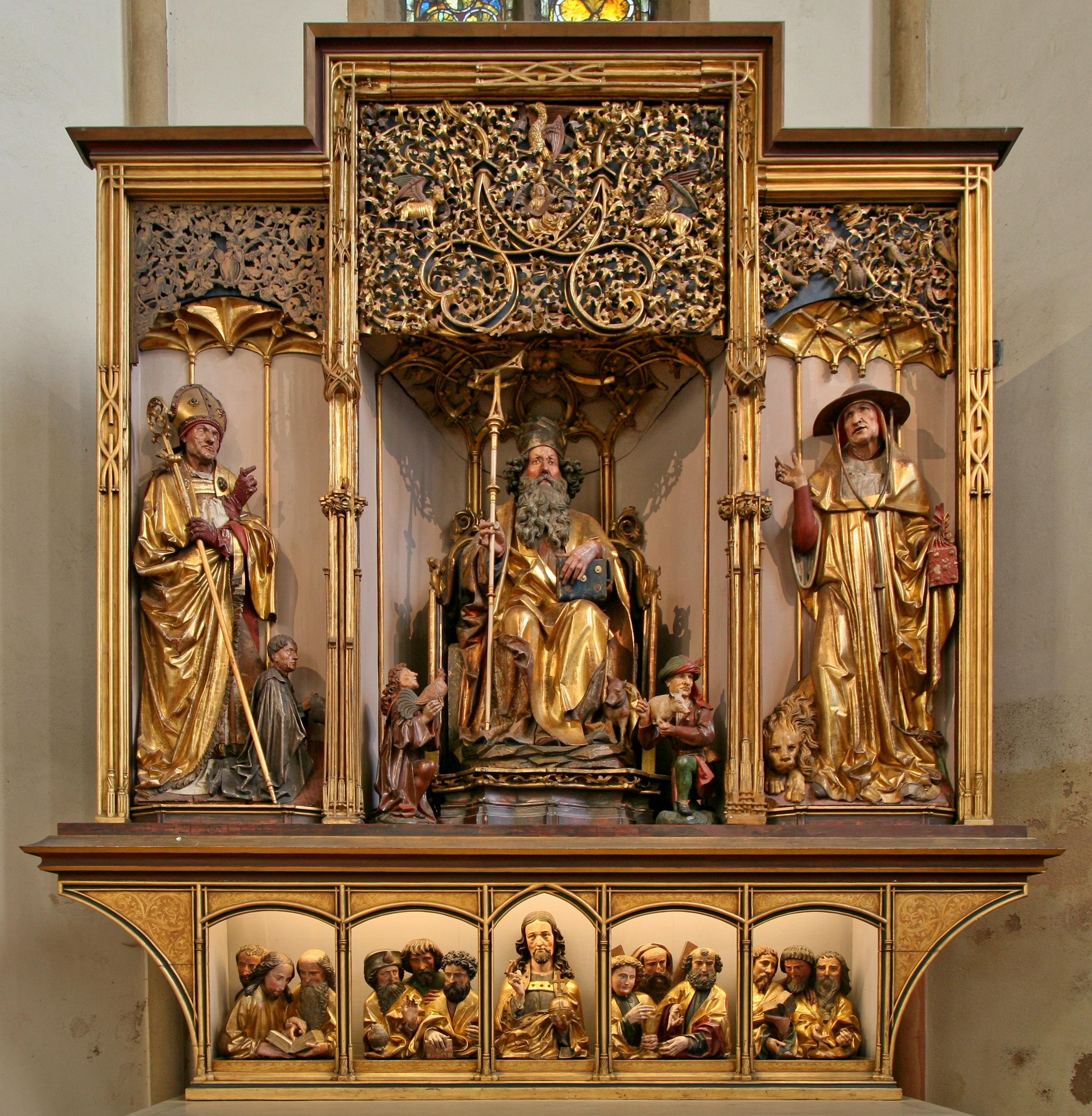 Retable d'Issenheim : partie sculptée (attribuée à Nicolas de Haguenau, sculpteur à Strasbourg vers 1500). Saint Augustin et Guy Guers, Saint Antoine, les porteurs d’offrande, Saint Jérôme, Le Christ et les apôtres Le retable ouvert permettait aux pèlerins et malades de vénérer saint Antoine, protecteur et guérisseur du feu de Saint-Antoine ou mal des ardents. Saint Antoine trône, tel un souverain, au centre de la caisse et à ses côtés se trouve l’emblème de la communauté, le cochon. De part et d’autre, deux porteurs d’offrande illustrent ces dons en nature, importante source de revenus pour les Antonins. Cette niche centrale est encadrée par saint Augustin et saint Jérôme, pères de l’Église. Le commanditaire, Guy Guers, est agenouillé aux pieds de saint augustin. Le Christ et les douze apôtres, technique mixte (tempera et huile) sur panneaux de tilleul et sculptures en tilleul polychromé